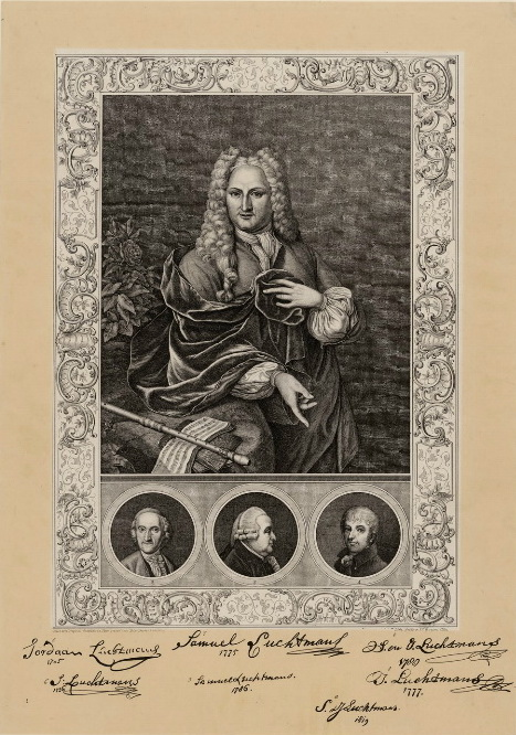 Halbfigur von Samuel Luchtmans dem Älteren, mit Umhang an einem Stein lehnend, darauf Flöte mit aufgeschlagenem Notenheft, hinten eine Rose, innerhalb Kreuzschraffur-Rechteck. Darunter drei Medaillonporträts mit Brustbild der Söhne und des Enkels: Samuel Luchtmans d. Jüngere; Johannes Luchtmans; Samuel Luchtmans d. Jüngste. Das Ganze eingefasst in Rocaille verziertem Rahmenrechteck. Darunter 7 faksimilierte Unterschriften. Objekt 67098670 (DNB, Deutsches Buch- und Schriftmuseum Leipzig). Peter Deckers Lithograph, J. C. Baum Lithographische Anstalt, Entstehungsort: Köln, um 1856 Druck, Druckgraphik. Papier, Lithographie (auf Karton (480 x 320 mm) montiert), 366 x 259 mm (Blatt), 1 Ex. Vorlageform Verfasserangabe: Bez. u.l.: Nach dem Original-Gemälde in Stein gravirt von Peter Deckers in Cöln; u.r.: Lith. Anst. v. J. C. Baum, Cöln. Leipzig, Deutsche Nationalbibliothek, Deutsches Buch- und Schriftmuseum, Sammlungskontext: Portraitsammlung der Börsenvereinsbibliothek, Inventar-Nr. ig19090, alte Inventar-Nr. P 38/2428 Ikonographie (Iconclass) Darstellung: Luchtmans, Samuel [1685-1757] Darstellung: Luchtmans, Samuel [1725-1780] Darstellung: Luchtmans, Johannes [1726-1809] Darstellung: Luchtmans, Samuel [1766-1812] Edition: Lempertz, Heinrich [1816-1898], Bilder-Hefte zur Geschichte des Bücherhandels, Köln : J. M. Heberle (H. Lempertz), 1856, Taf. I, neue Nr. 38